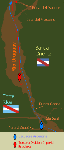 Persecución de la escuadra brasilera, Dic.1826 - Ene.1827. Río Uruguay (Guerra del Brasil)